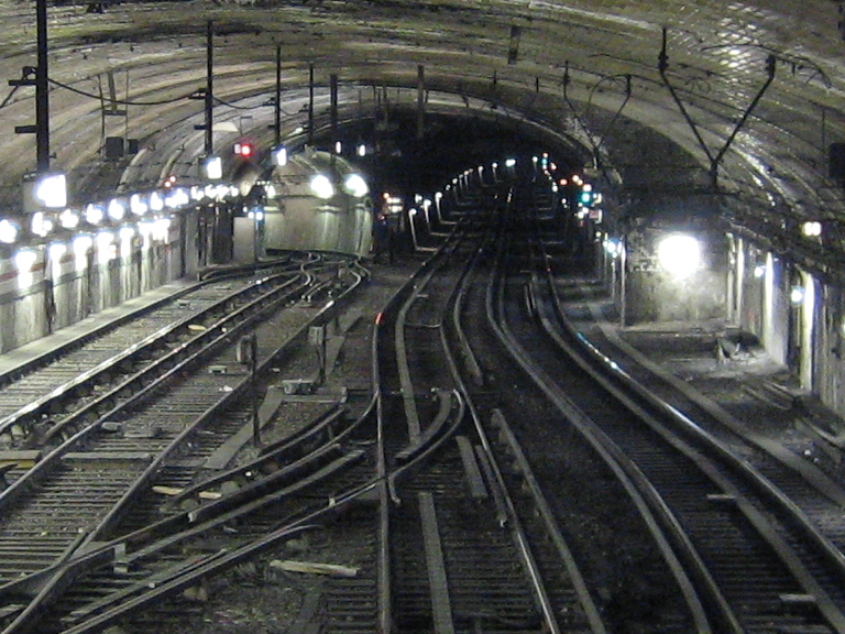 Photo limitée à l'accès à l'atelier de Vaugirard, à gauche, au nord de la station Porte de Versailles, ligne 12 du métro de Paris.